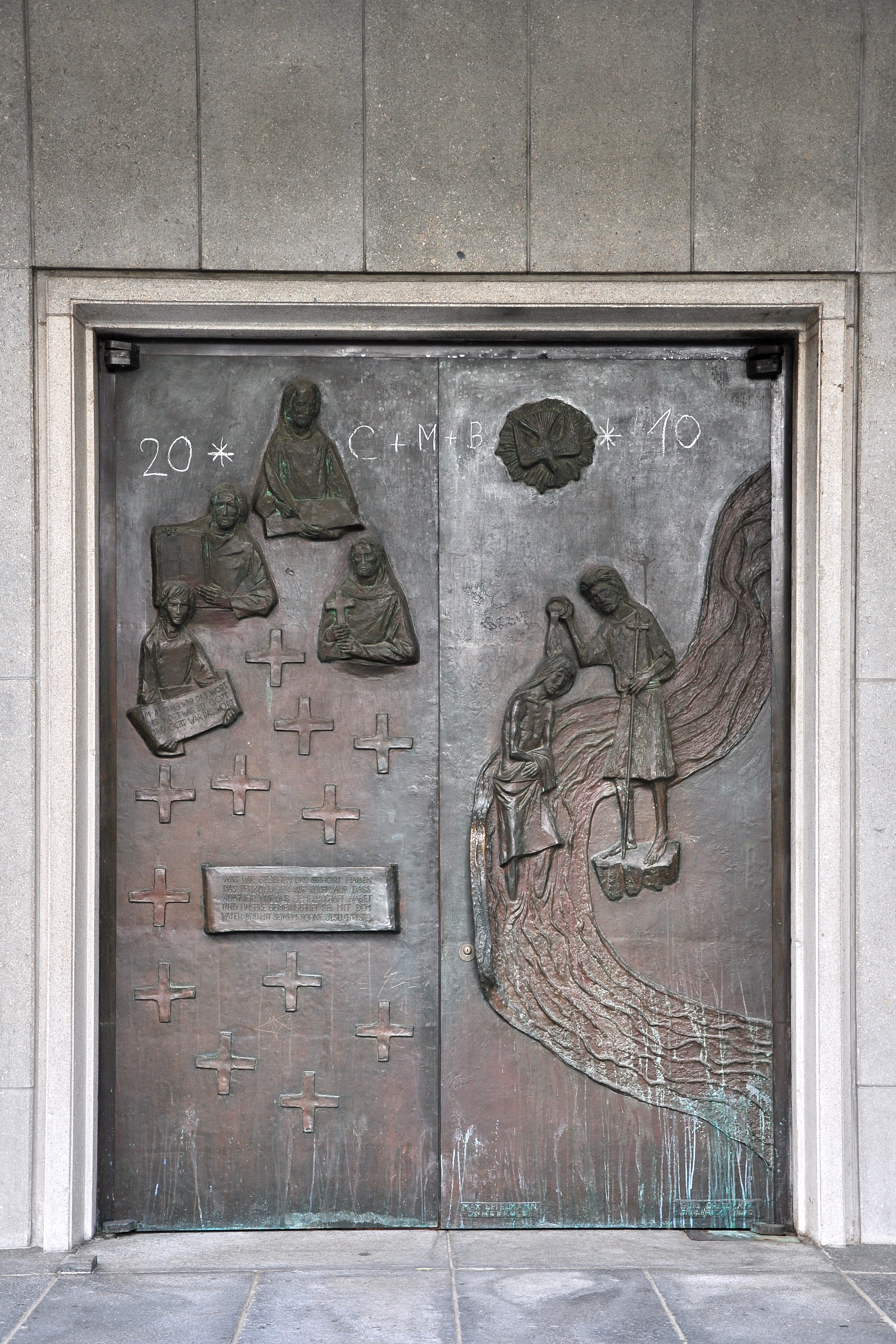 Römisch-katholische Kirche in Dübendorf (Switzerland)